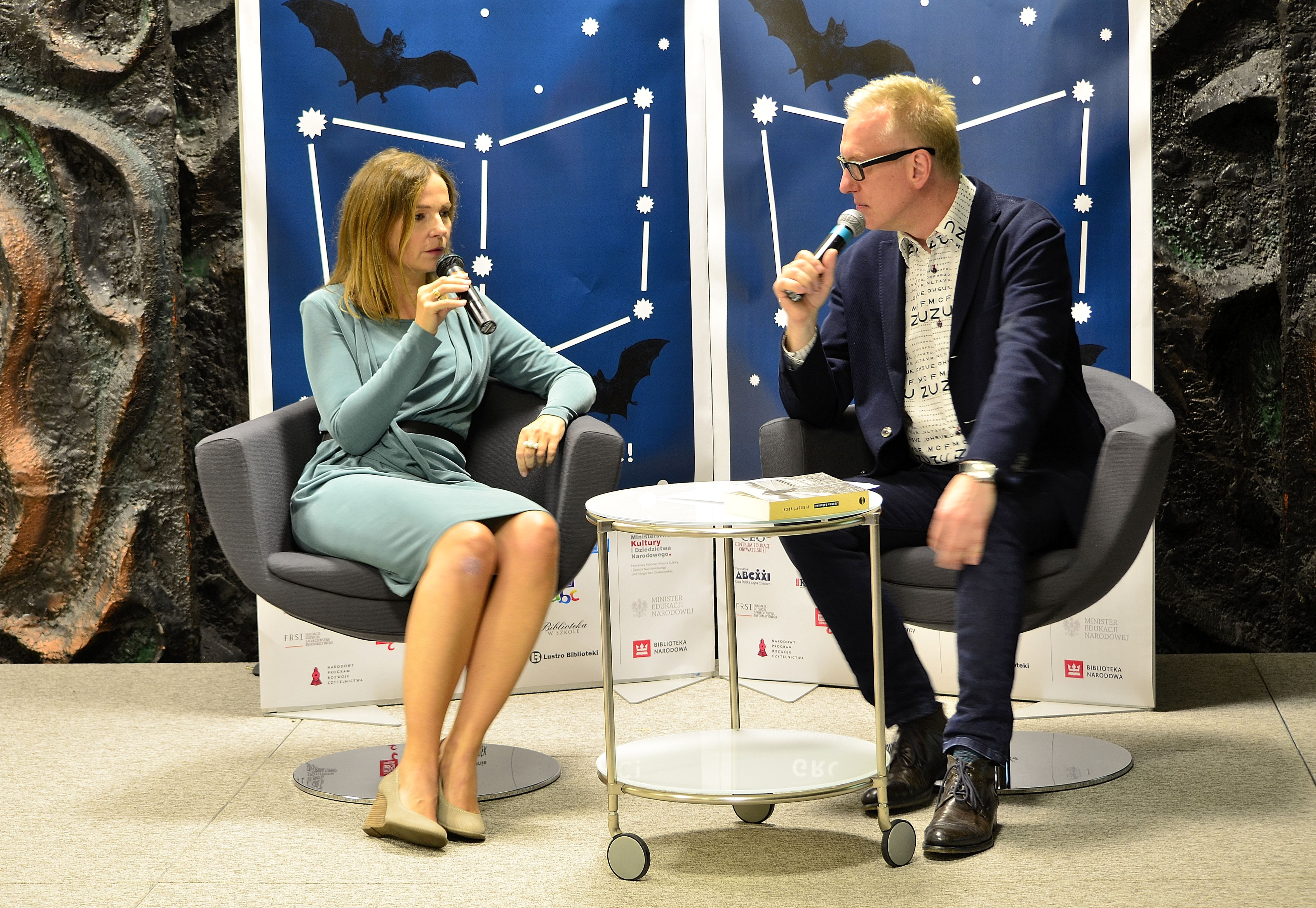 Joanna Bator i Mariusz Szczygieł podczas Nocy Bibliotek w Bibliotece Narodowej w Warszawie